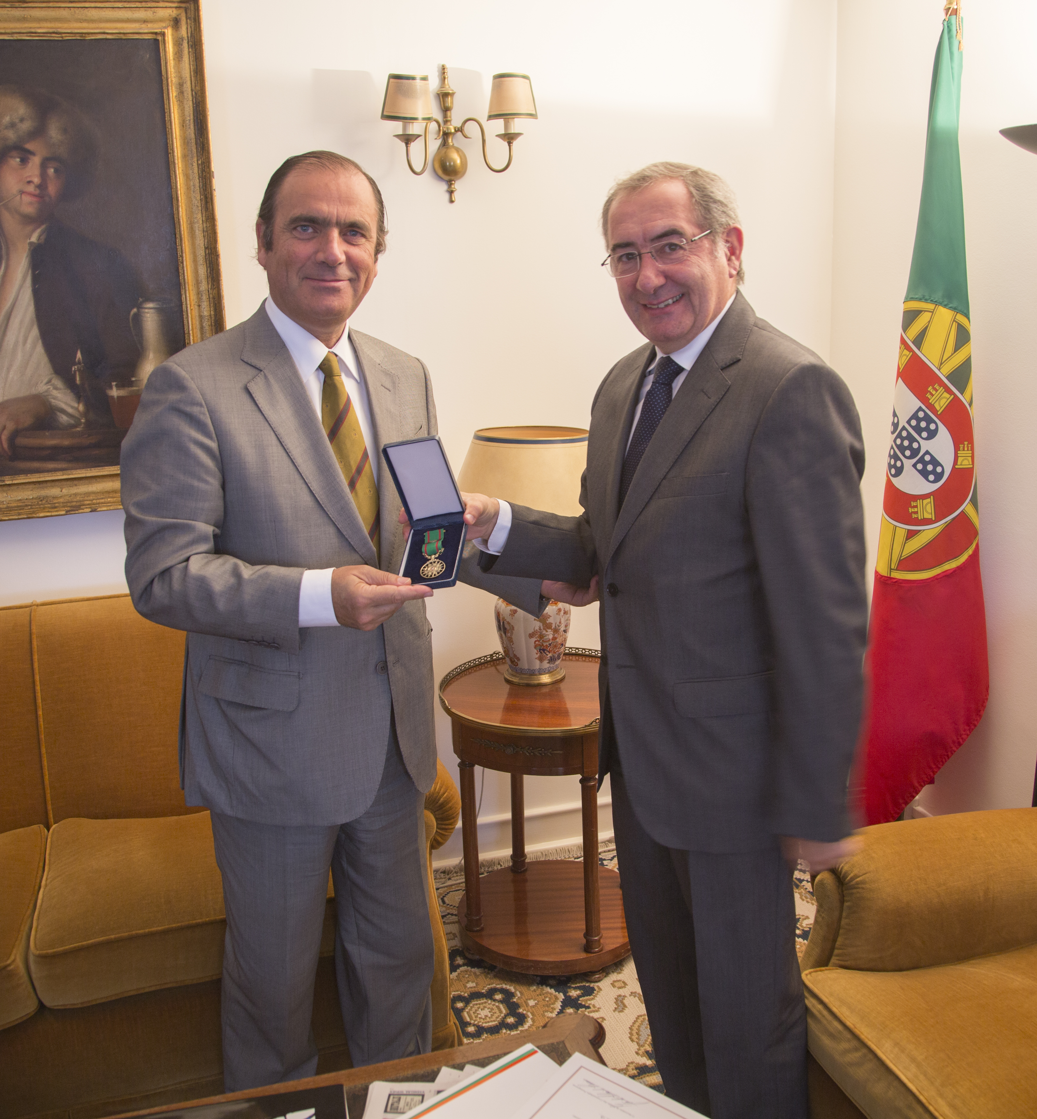 Condecoração de Carlos Morais, por parte do Secretário de Estado das Comunidades Portuguesas da época, José Cesário, em 2015.